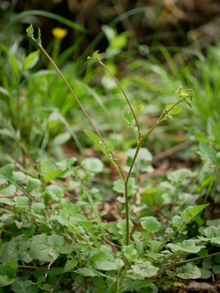 2019/04/13 和歌山県田辺市：Tanabe City. Wakayama Pref. Japan